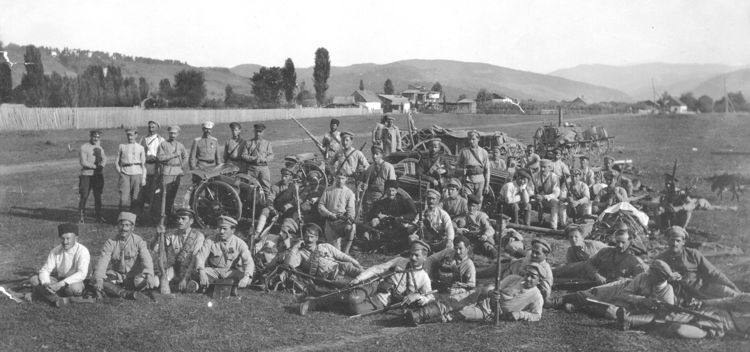 სახალხო გვარდიის არტილერია და შტაბი სოჭის რაიონში 1919 წ.